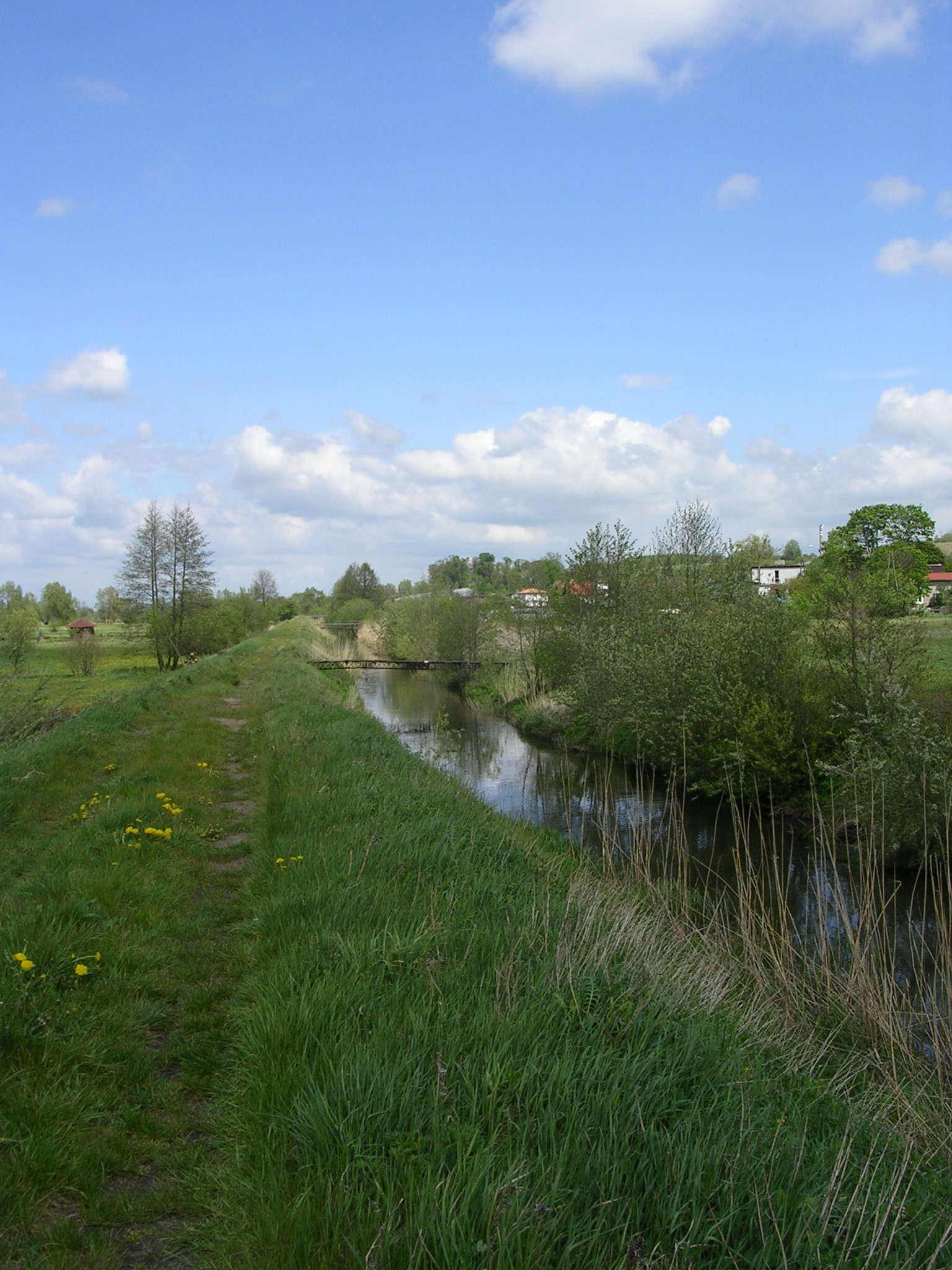 Liwa niedaleko Kwidzyna, Poland